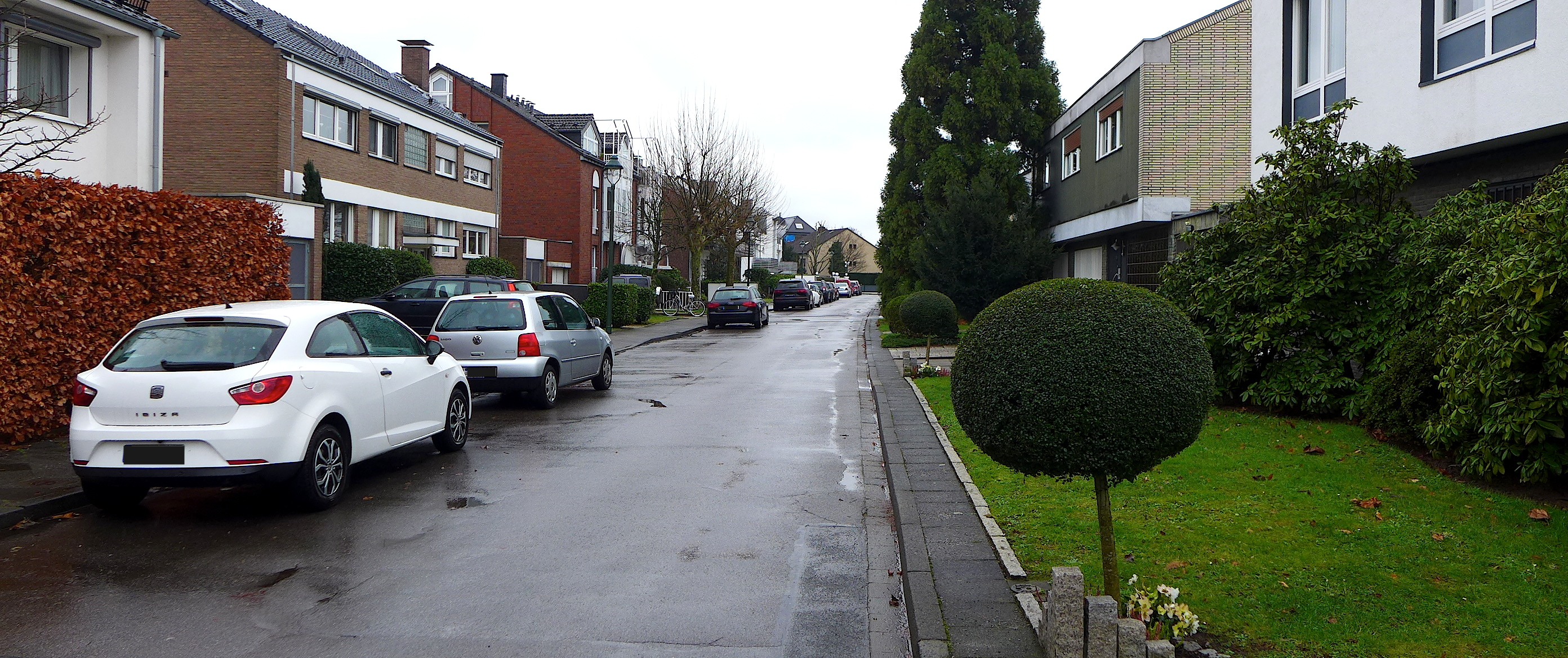 "У Водонапорной башни". Так называется одна из улиц Бенрата (Дюссельдорф).